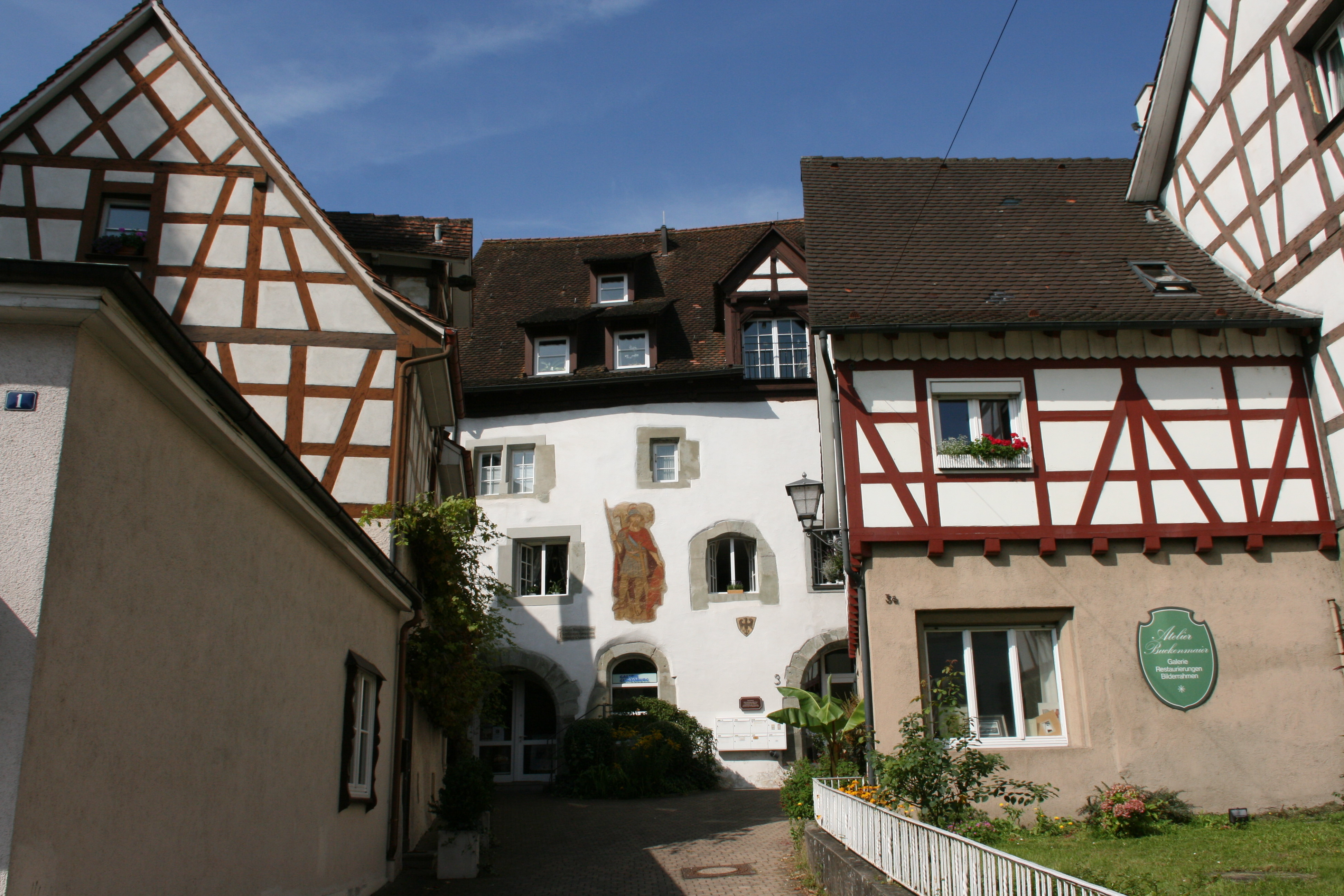 So genannte Gunzoburg, Aufkircher Straße 3 in Überlingen